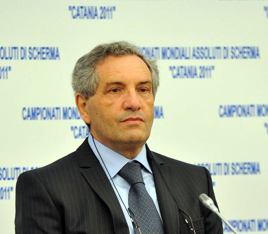 il presidente della federazione italiana scherma giorgio scarso